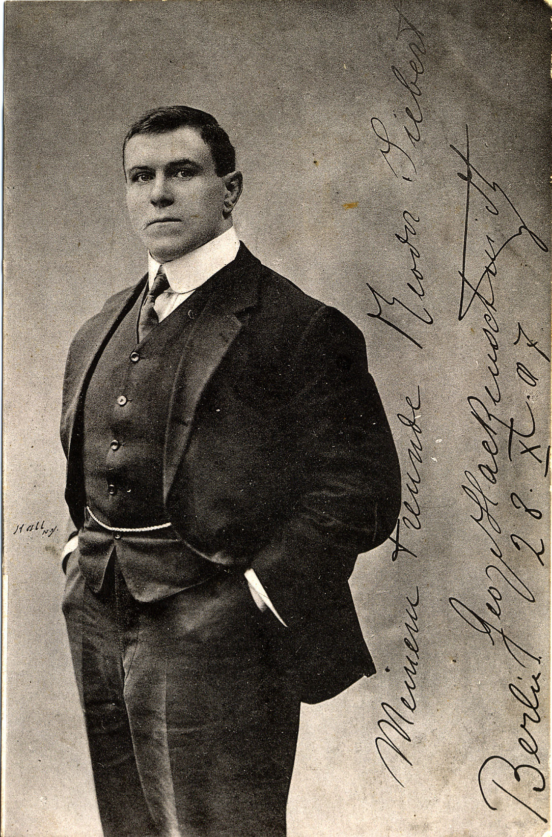 MuuseumikoguFotokoguOriginaaloriginaalSäilivusrahuldav pealkiri Maadleja Georg Hackenschmidt ca 1905. 3/4figuur, tumedas vestiga ülikonnas. Esiküljel saksakeelne aotogramm Berliinist 1907.